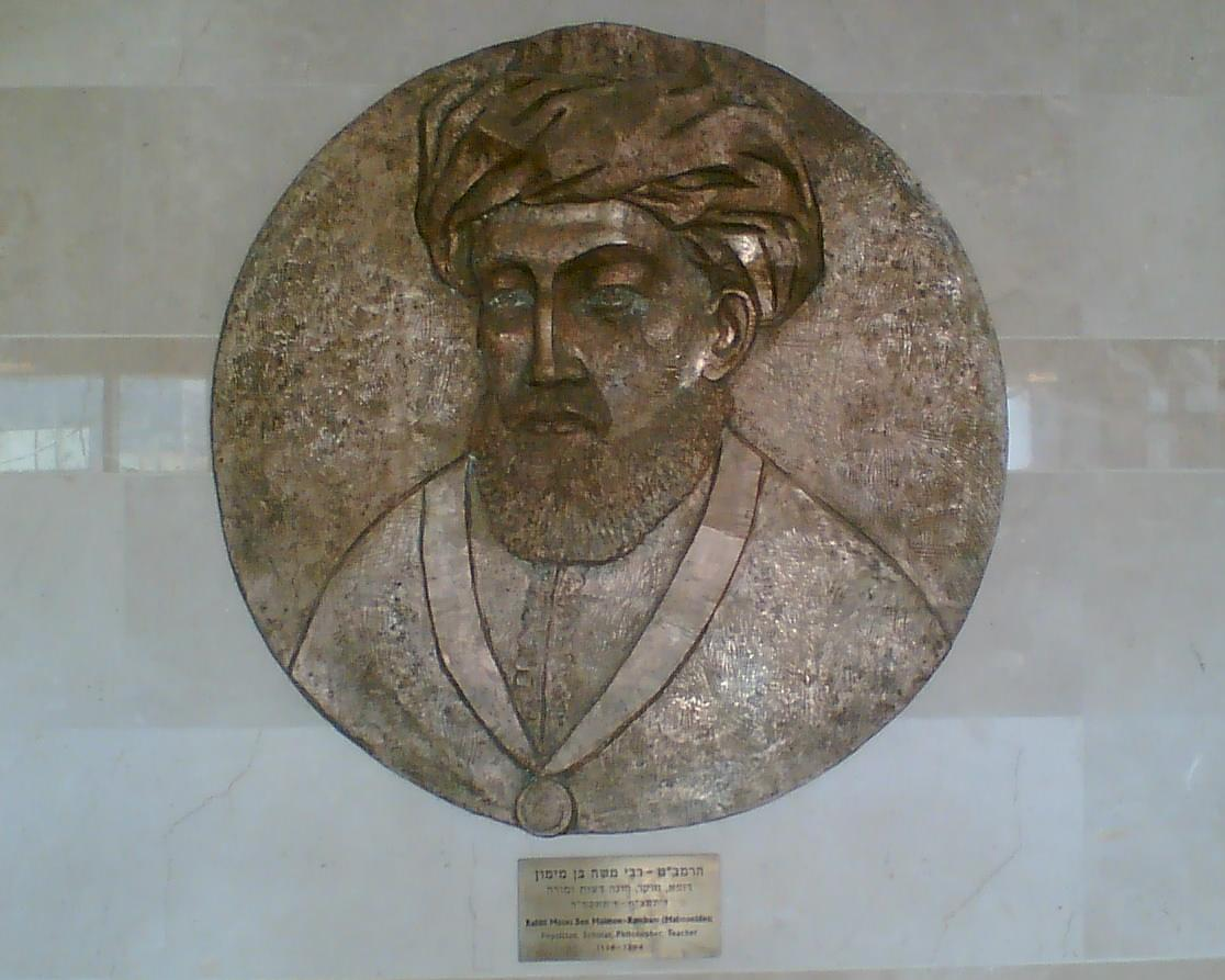 Maimonides, at Rambam Medical Center, Haifa